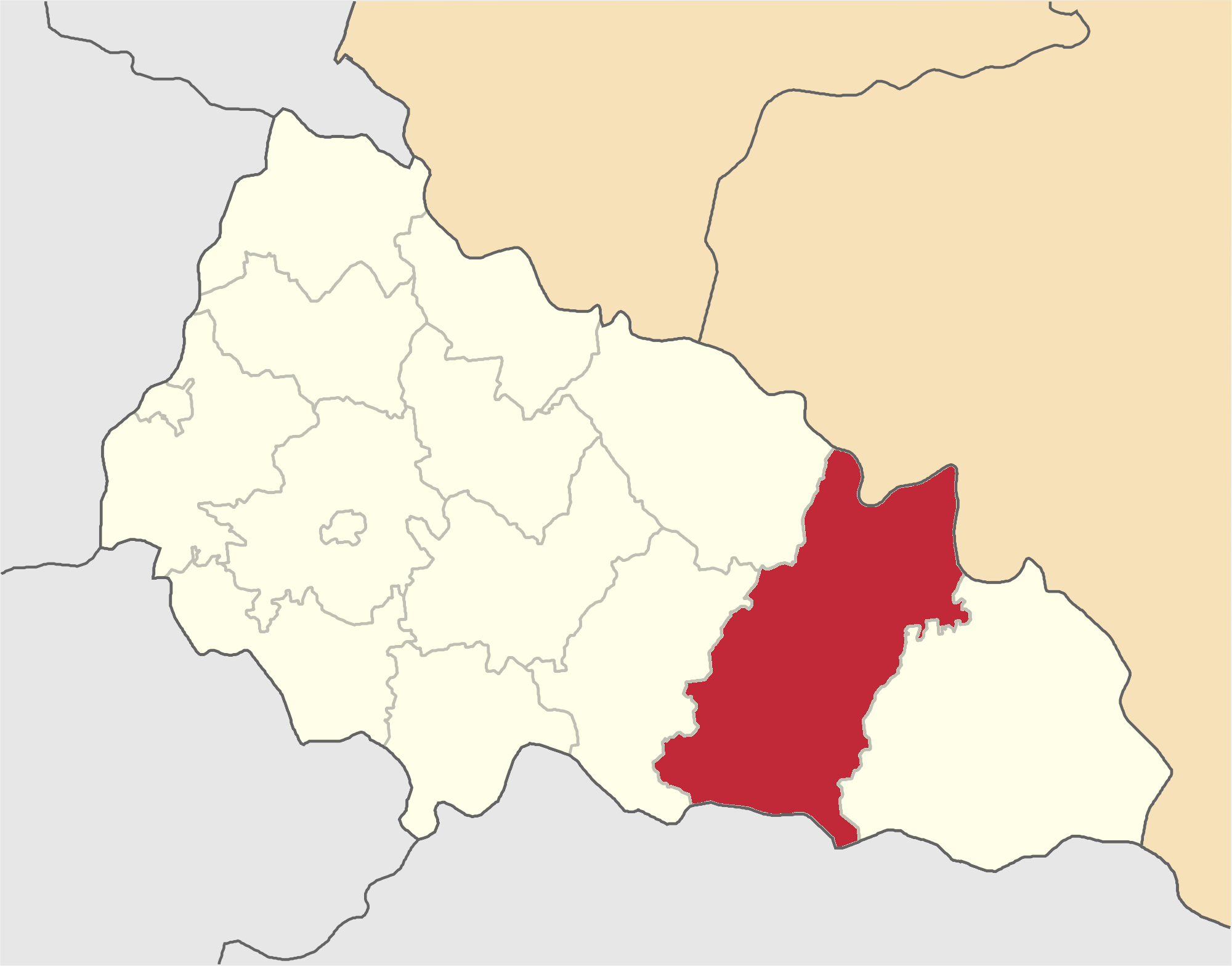 Tyachivskyi-Raion map